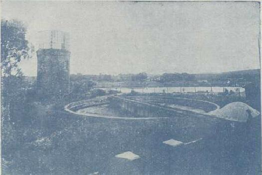 刊名： 铁展 出版周期： 刊期不详 出版年份： 1934 主办单位： 铁道部全国铁路沿线出产货品展览会出版 出版地： 北京